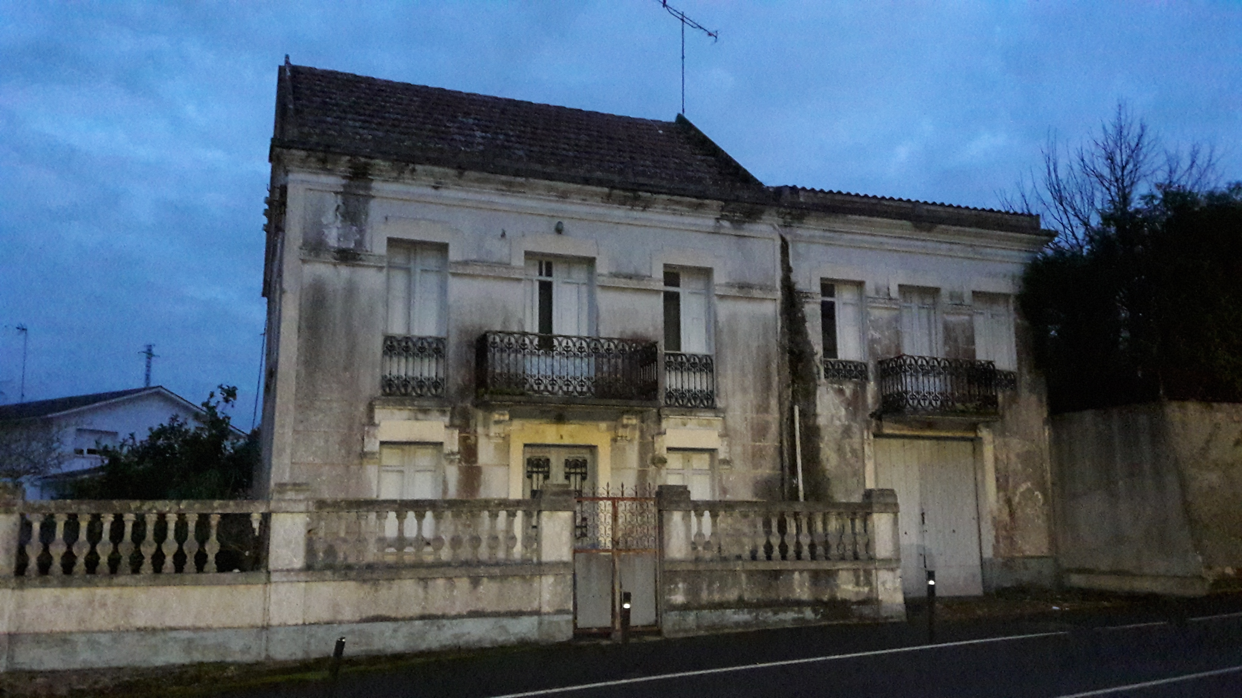 "Casa de la Dicha" ("Casa da Felicidade"), residencia de Francisco Miguel e Syra Alonso en Coruxo de Abaixo (Oleiros)